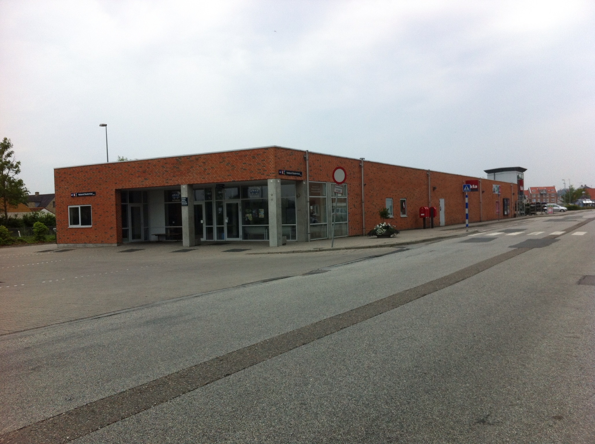 Hadsund Rutebilstation, Jernbanegade, 9560 Hadsund.